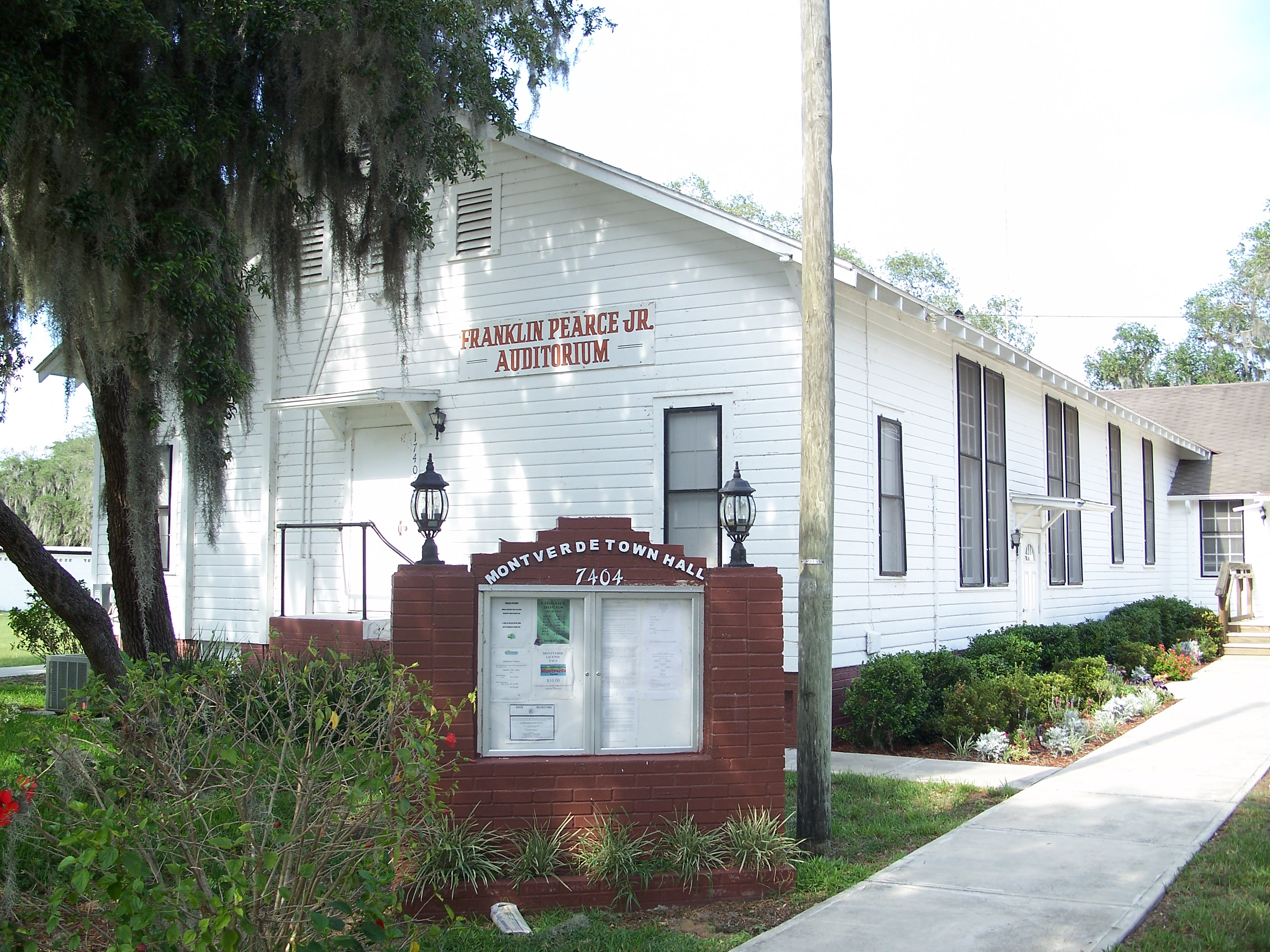 Montverde town hall, in Montverde, Florida